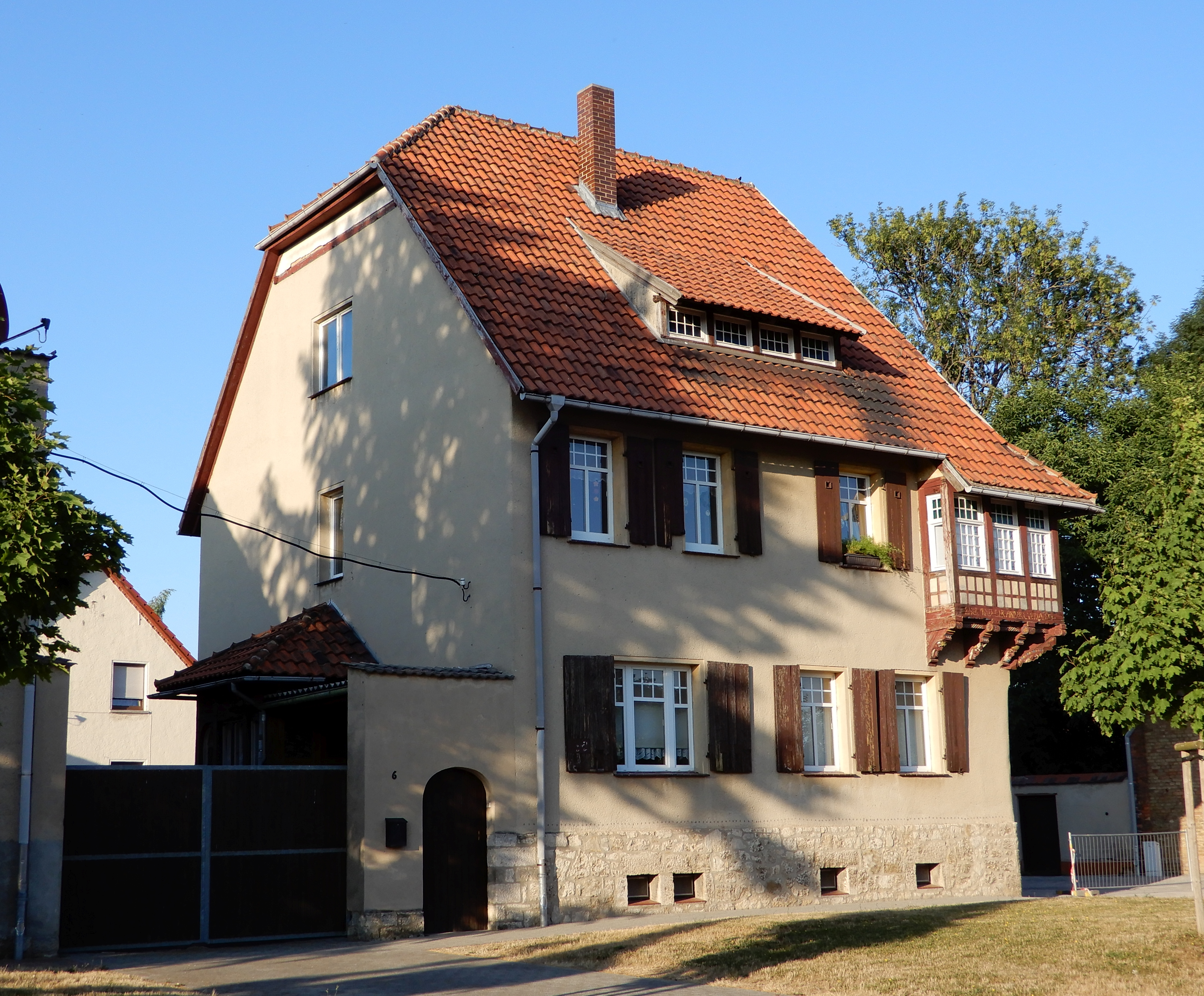 Gatersleben, Neuer Weg 6